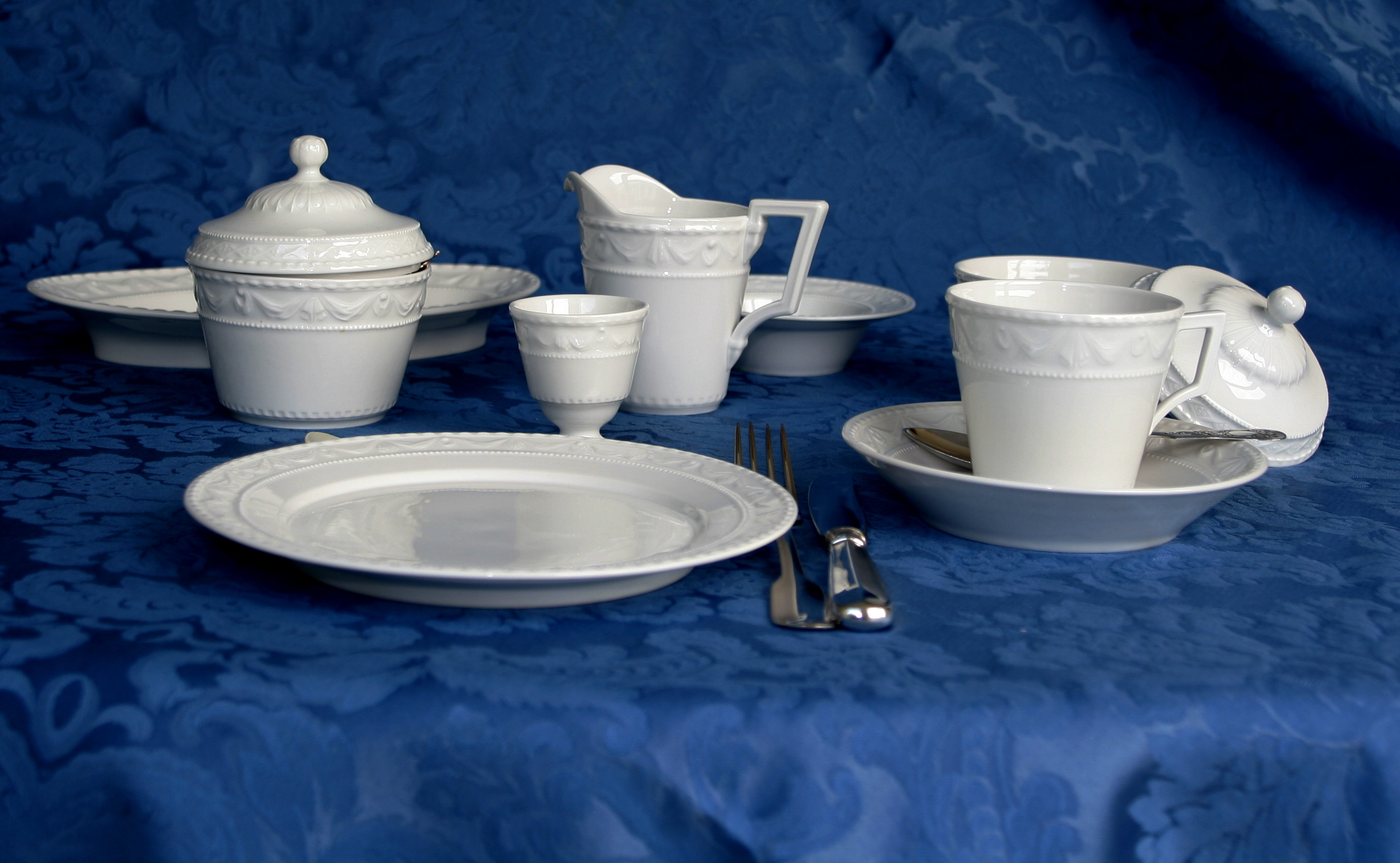 KPM "Königliche Porzellan Manufaktur" serie Kurland